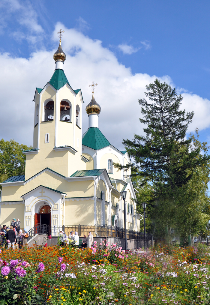 Каменный храм г.Николаевск-на-Амуре